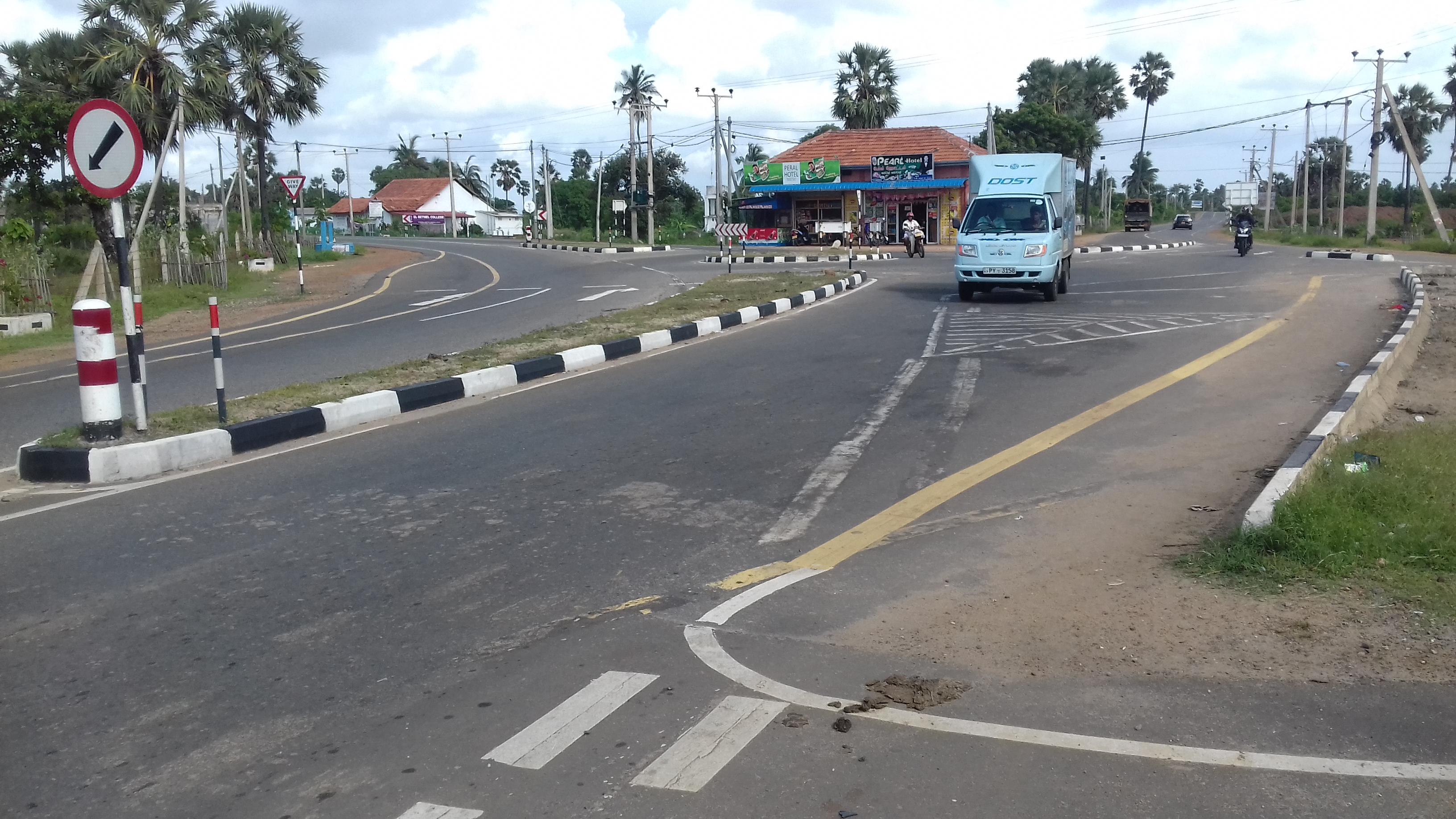 this is a road view